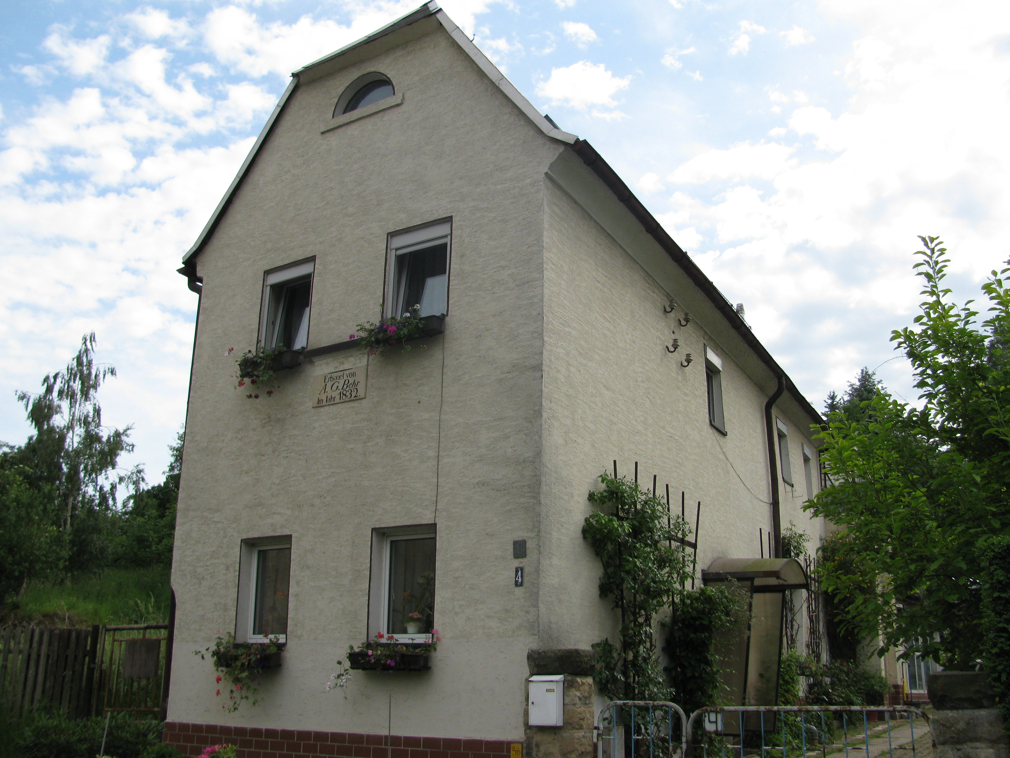 Gebäude im Dorfkern von Großluga, Landeshauptstadt Dresden